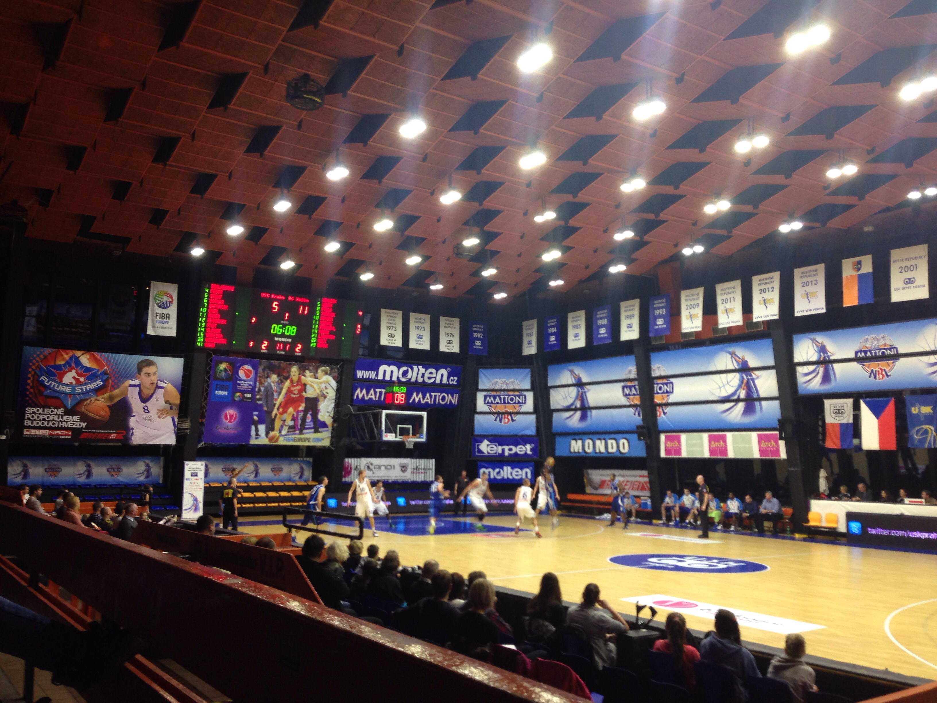 Vnitřek sportovní haly při zápase mužů